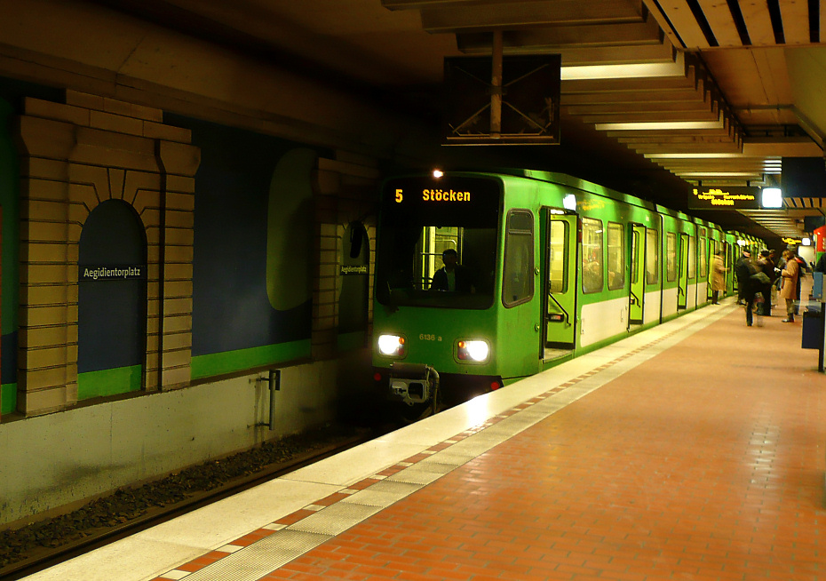 U-Bahnstation Aegidientor